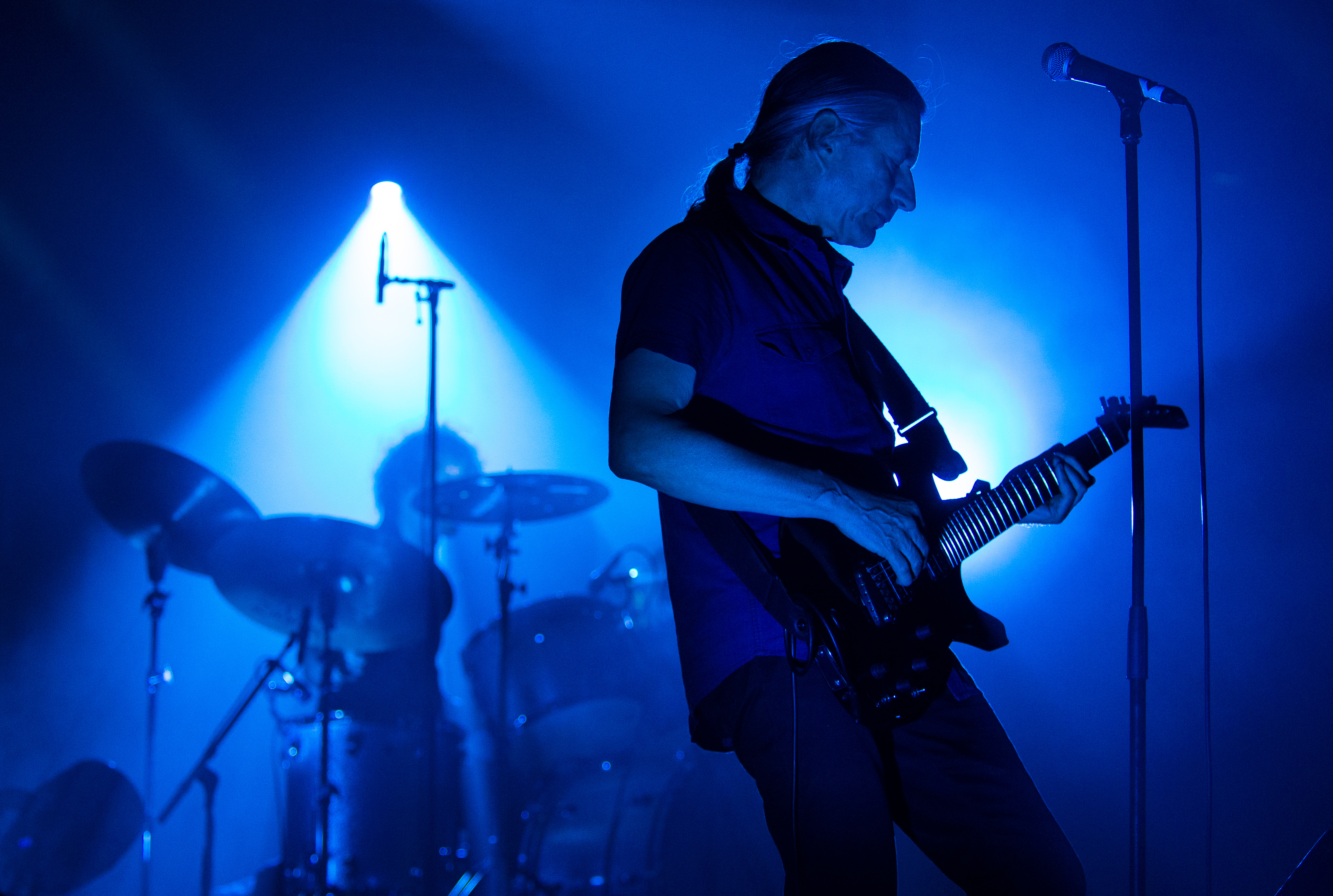 Concert du groupe suisse The Young Gods au Hellfest 2019, Clisson, France.